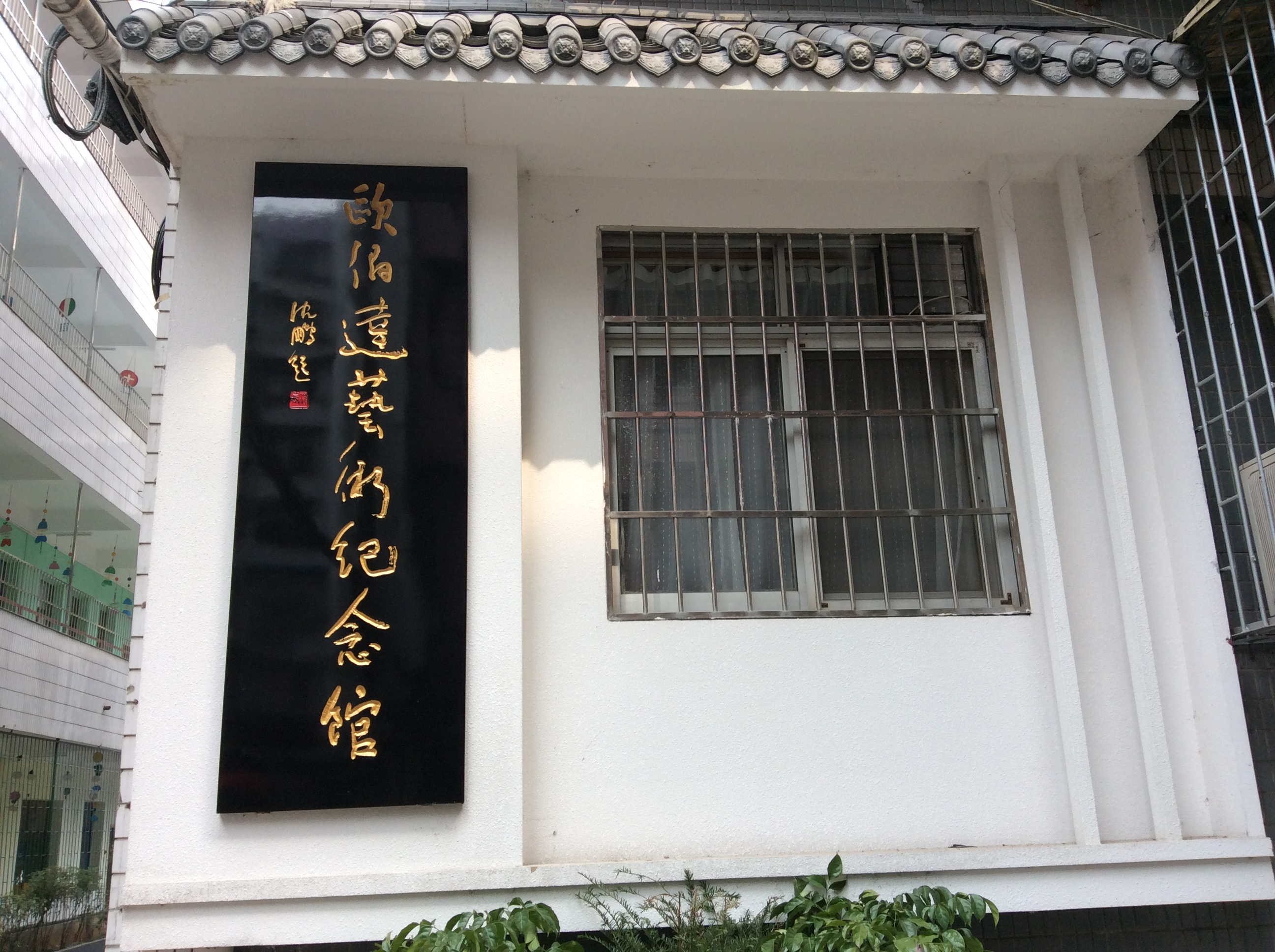 欧伯达艺术纪念馆侧窗